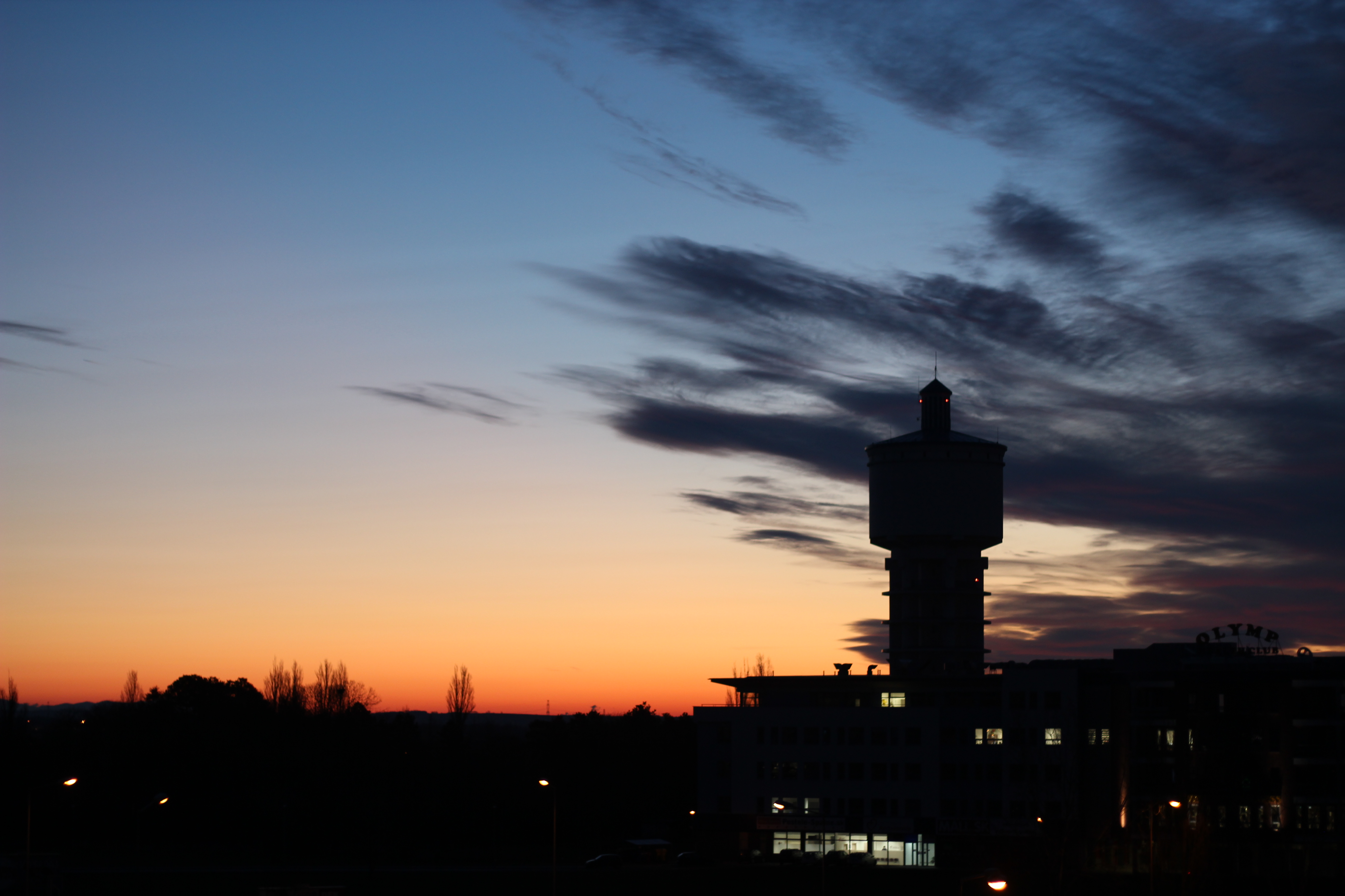 Belušov vodojem v Trnave pri východe slnka